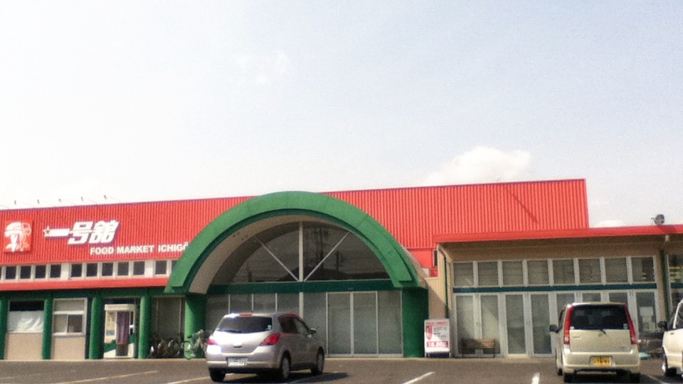 一号館の写真です。